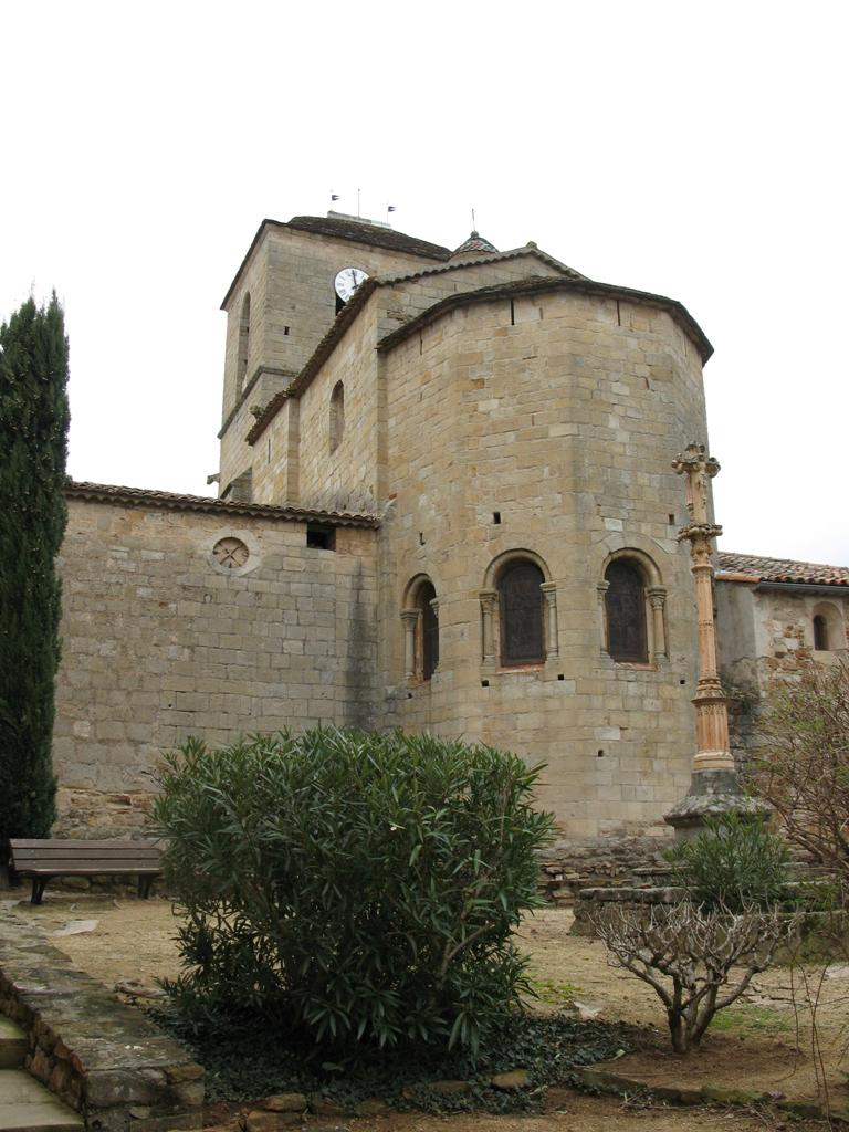 Vinezac